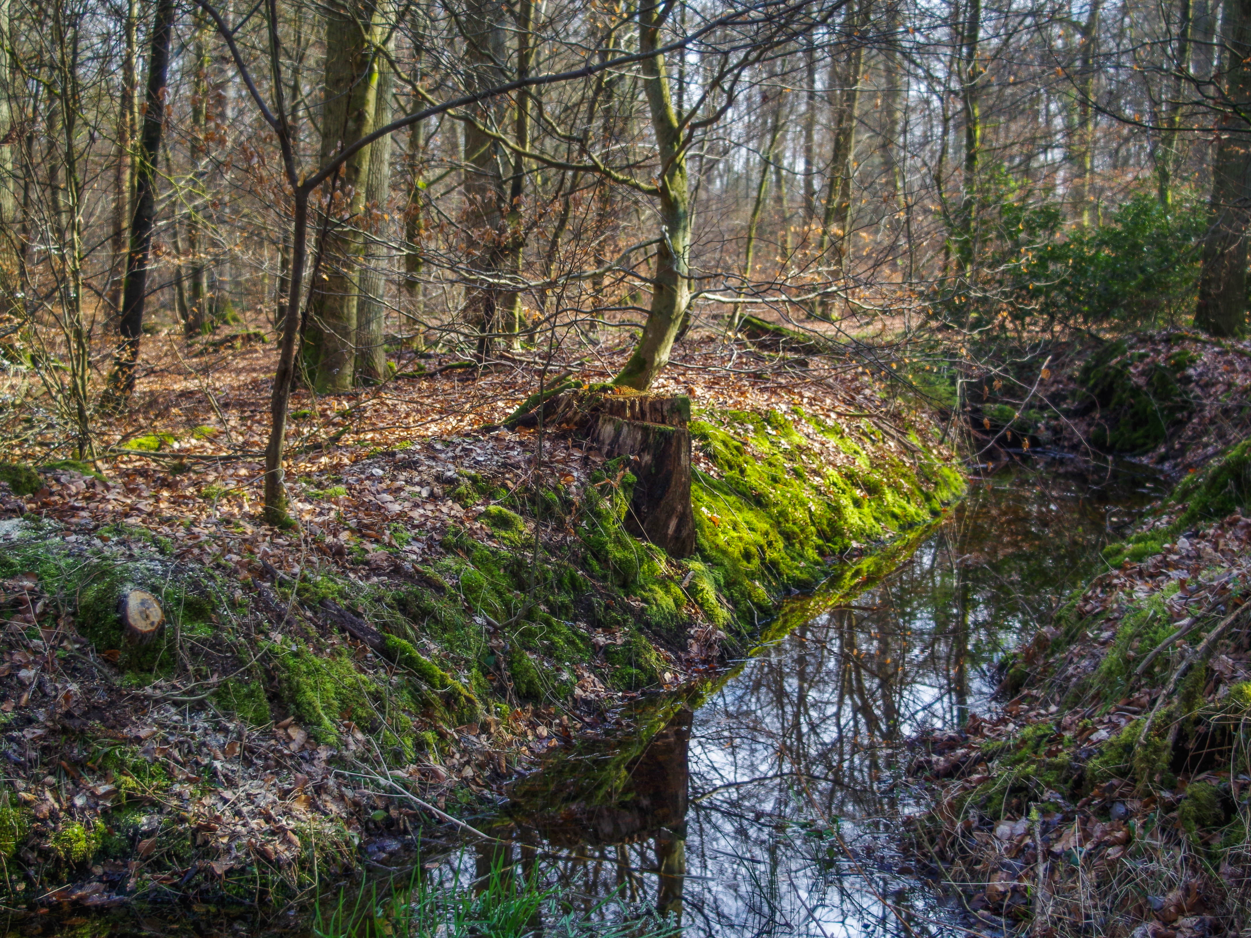 Un canal dans la forêt.